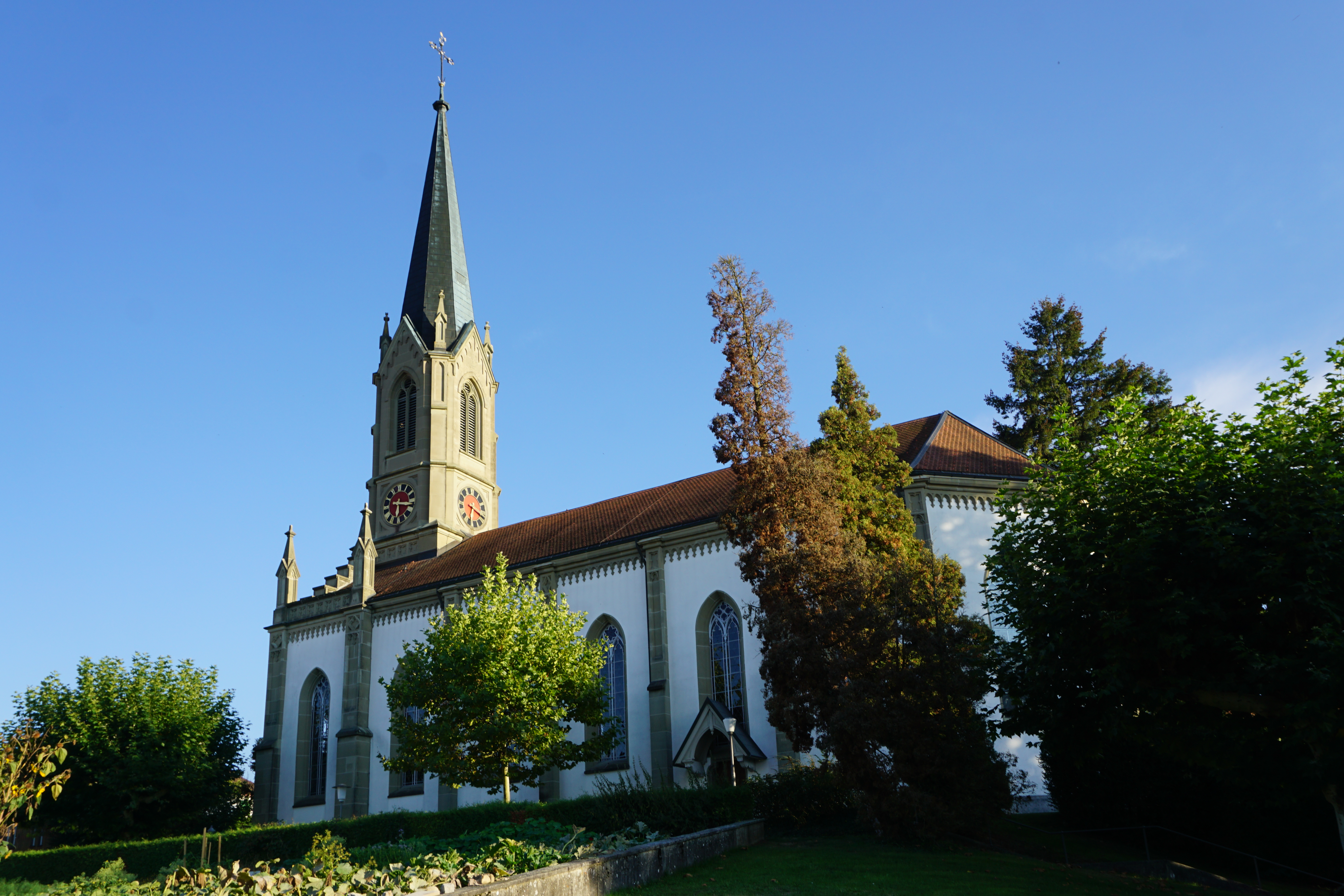 r. Kirche, südost